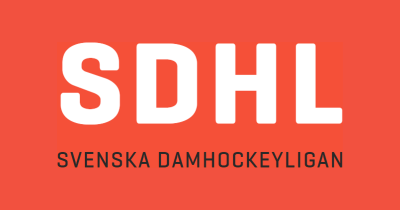 Logo der SDHL